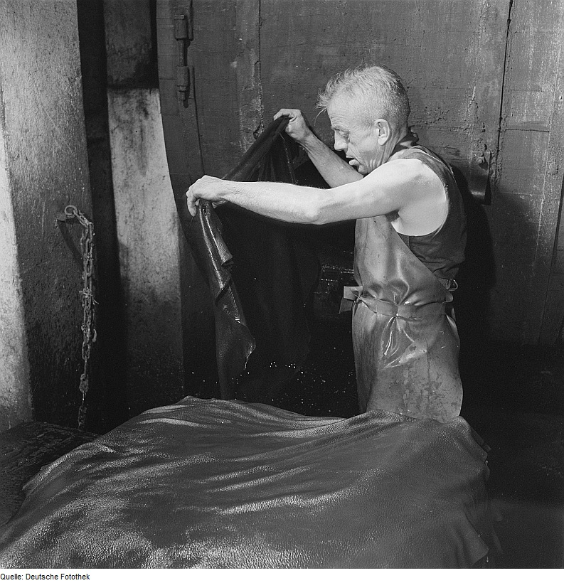 Original image description from the Deutsche Fotothek Lederwerk